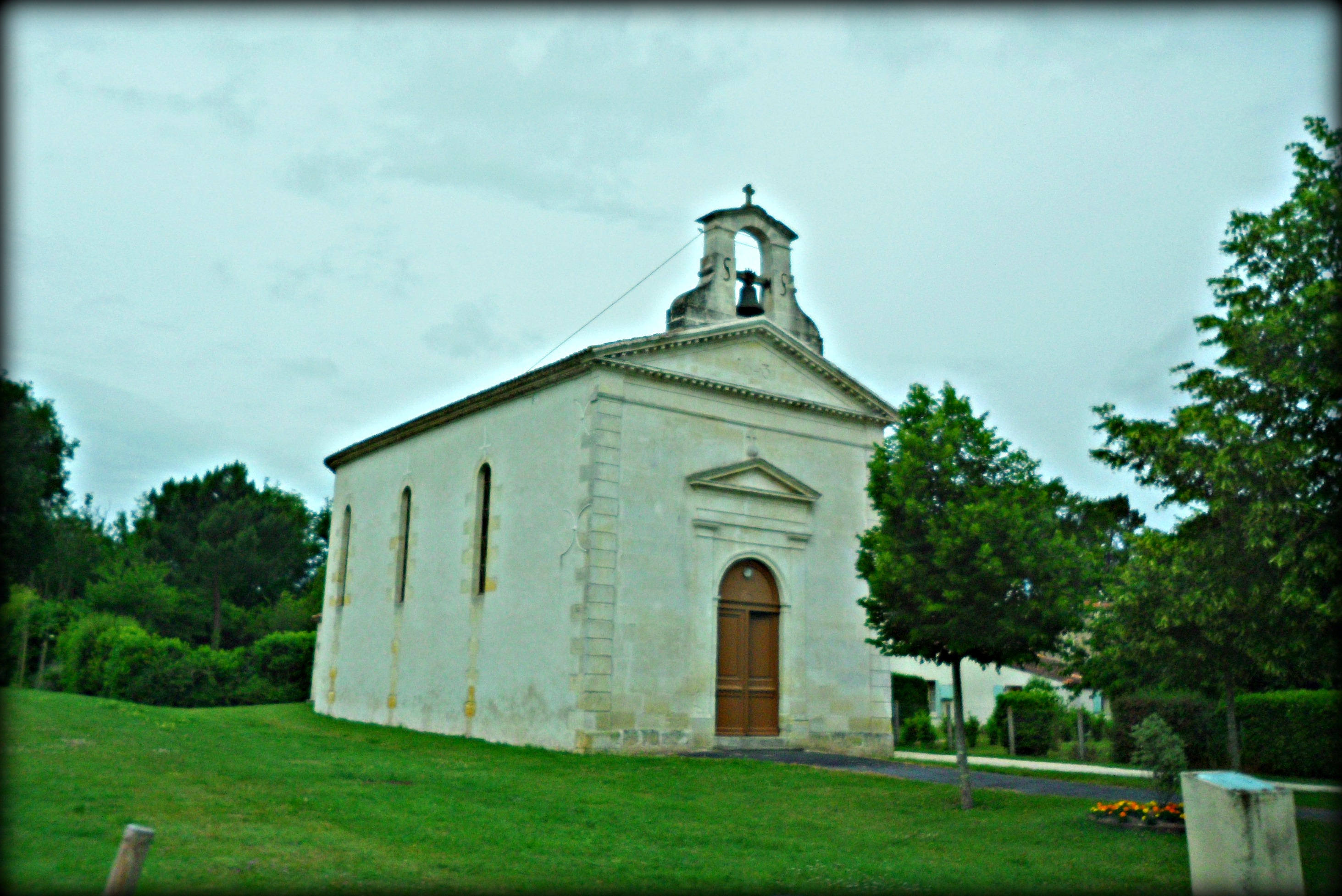 L'église de Saint-Augustin en Charente-Maritime.